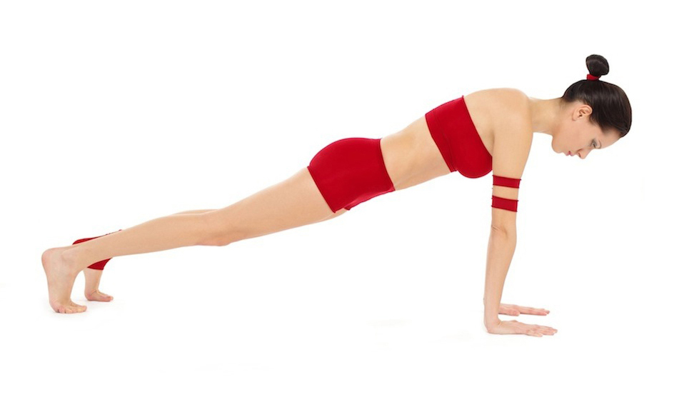 Chaturanga Dandasana in high variation